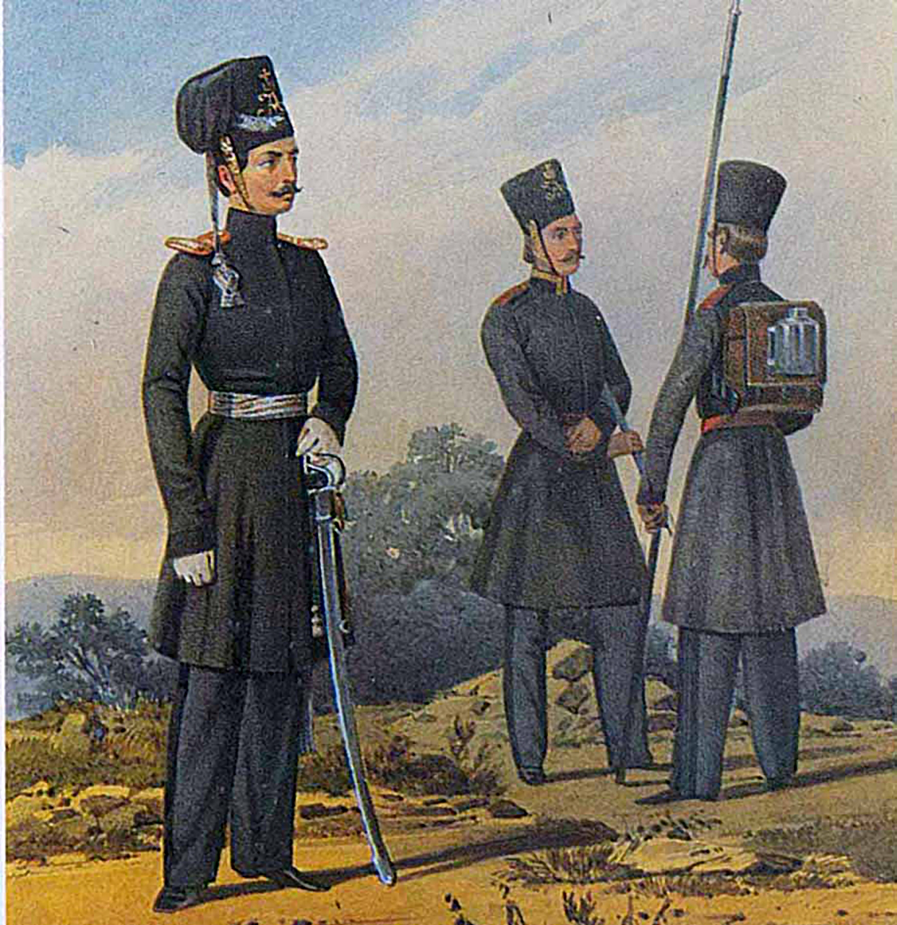 ОБЕР-ОФИЦЕР, УРЯДНИК и КАЗАК Пеших полков Тульского ополчения, 1812-1813. Раскрашенная литография Александра Клевезата с оригинального рисунка художника П. К. Губарева